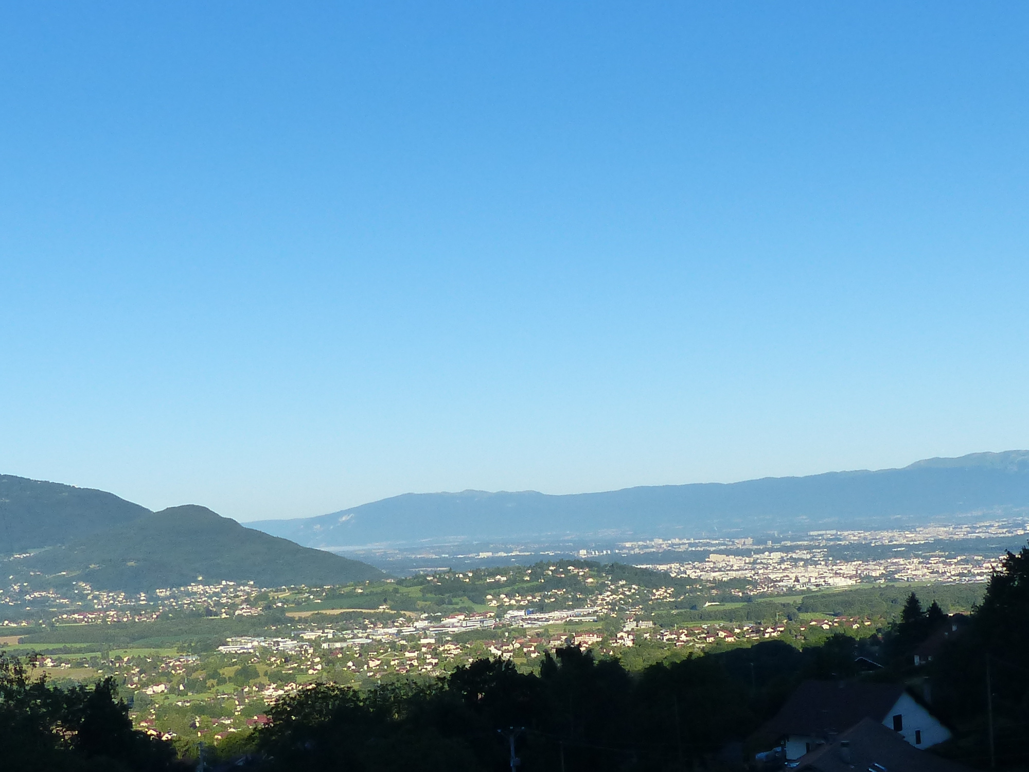 La colline de Vétraz-Monthoux vue de Lucinges, Haute-Savoie, France. À l'arrière-plan à droite, Annemasse, Genève. Au fond le Jura.